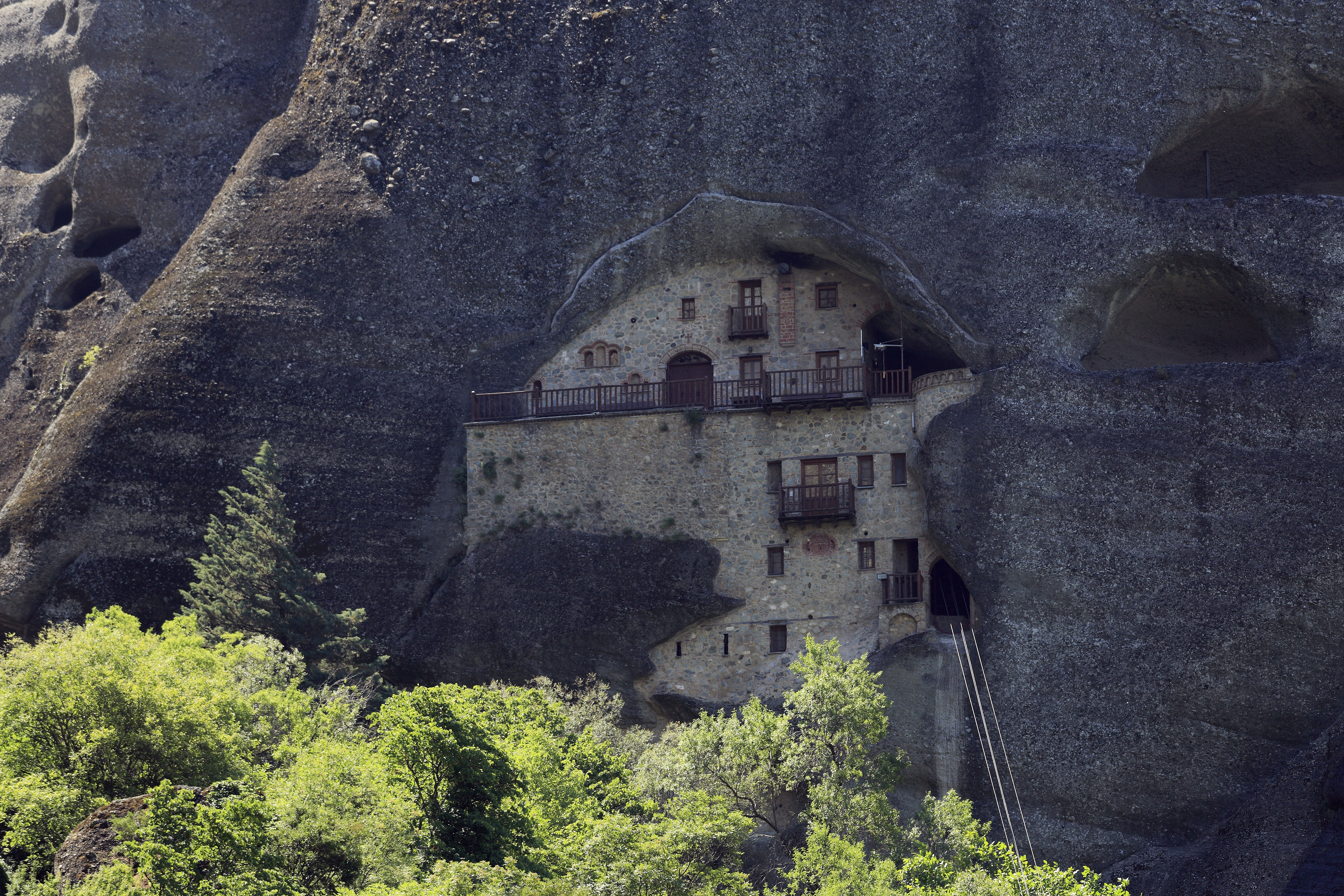 In der Südwestwand des Bandovasteins, nach den Angaben in den erhältlichen Büchern wurde die Anlage 1943 durch einen Bombentreffer zerstört und wäre seitdem ungenutzt. Offensichtlich wurde sie doch wiederaufgebaut. Wie auch das in unmittelbarer Nachbarschaft liegende Kloster Ágios Andónios ist das Kloster für die Öffentlichkeit nicht zugängig. Beide werden trotz ihrer Lage zwischen Kalambáka und Kastráki von den meisten Besuchern nicht wahrgenommen.Ob die Seilbahn unten rechts nur für Materialtransporte genutzt wird oder den einzigen Zugang darstellt, ist nicht erkennbar.